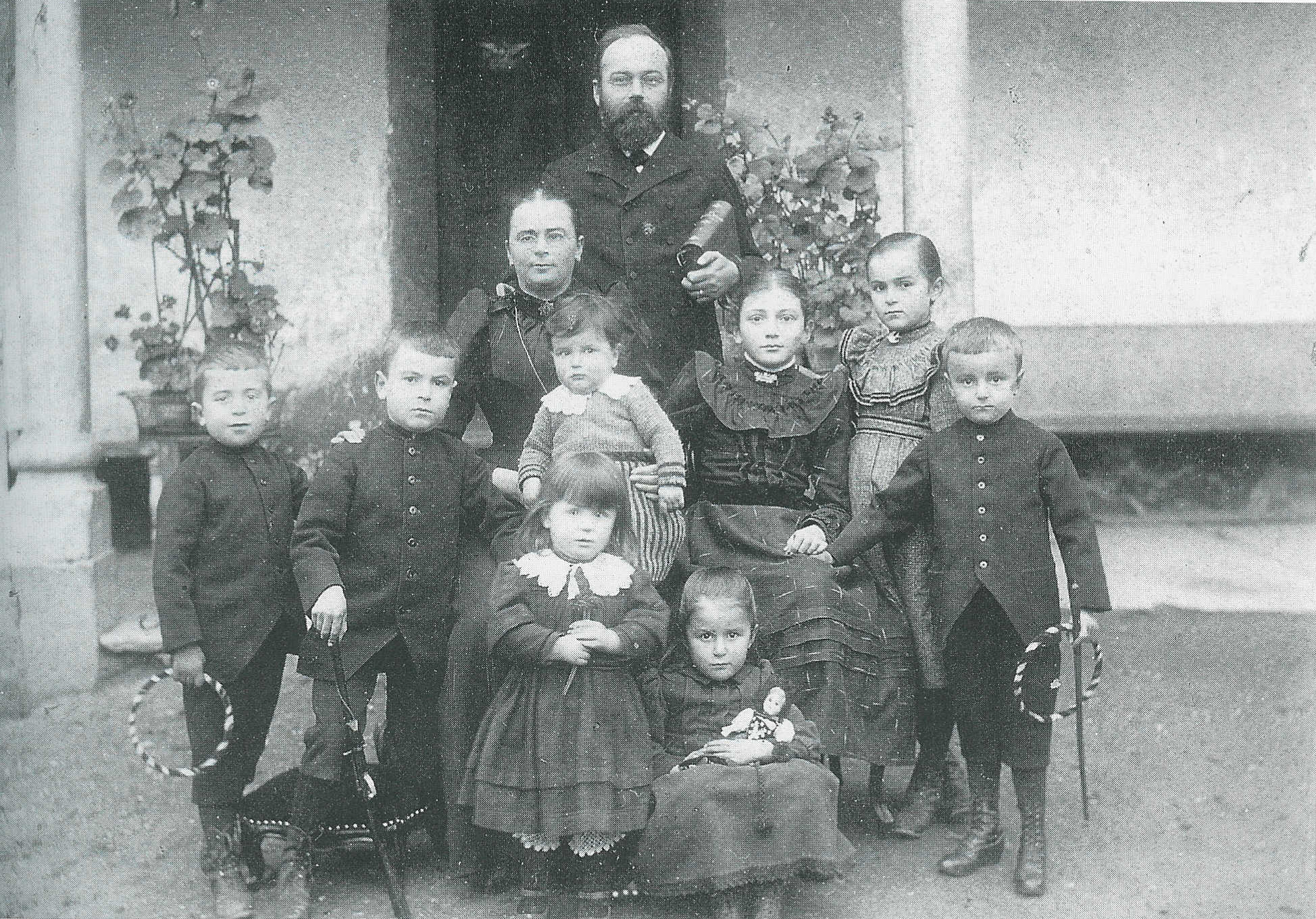 Die Pfarrersfamilie Strasser um 1893. Die Kinder (von l. nach r.): Werner, Gottfried, Wilhelm (auf dem Schoss der Mutter), davor Gertrud, Hedwig (am Boden sitzend), Elise, Johanna und Karl.